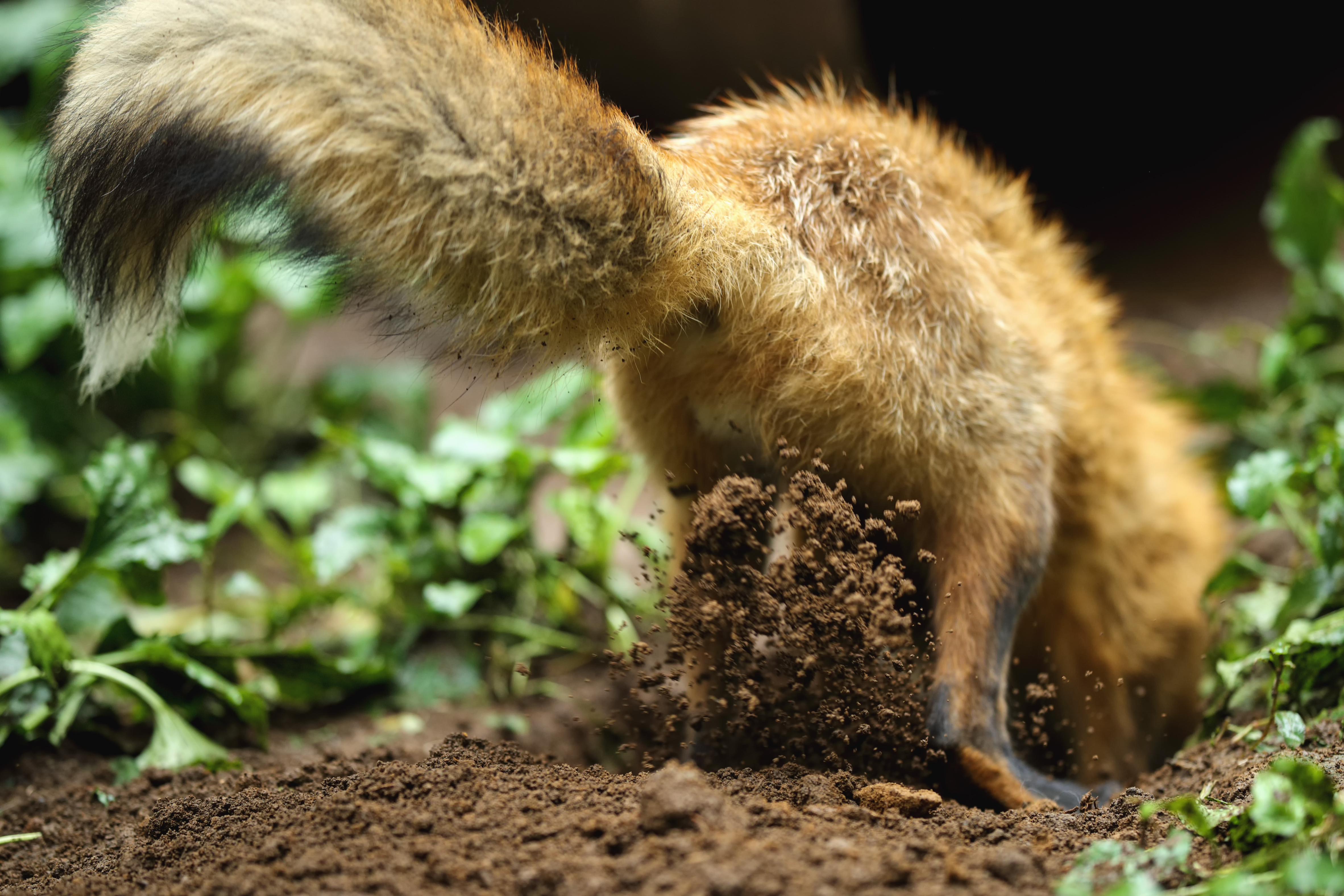 蔵王キツネ村で撮影された穴を掘るアカギツネ